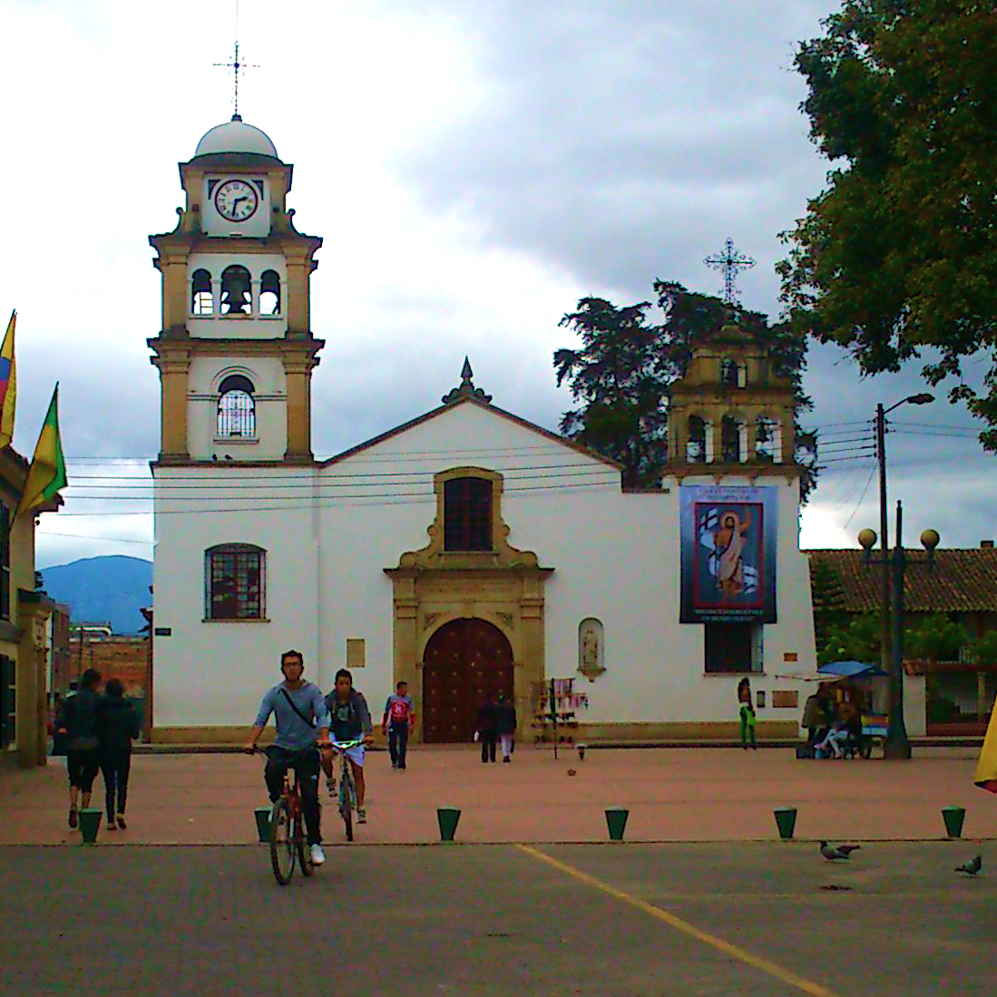 Fachada de la Catedral Santiago Apóstol de Fontibón.